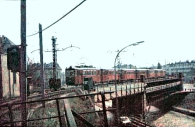 Wiener Stadtbahnstrecke überquert den Wienfluss kurz vor Hütteldorf, März 1980